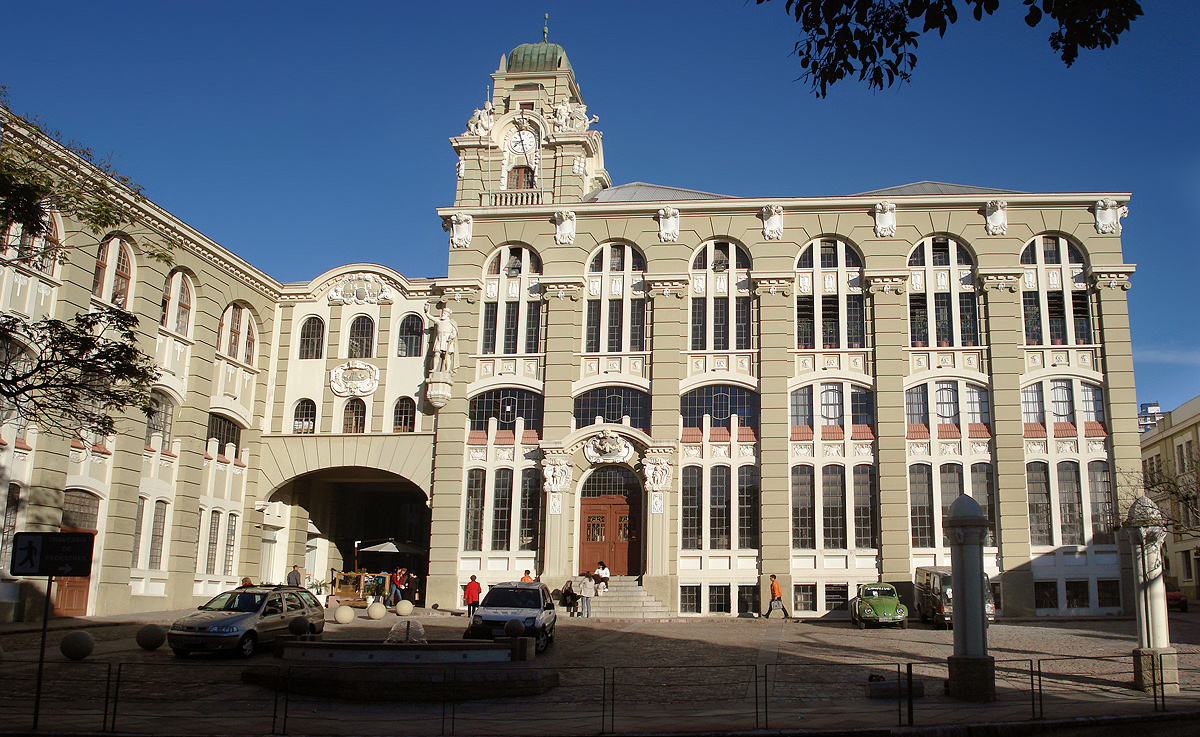 Prédio da antiga Cervejaria Brahma, hoje o Shopping Total. Porto Alegre, Brasil.